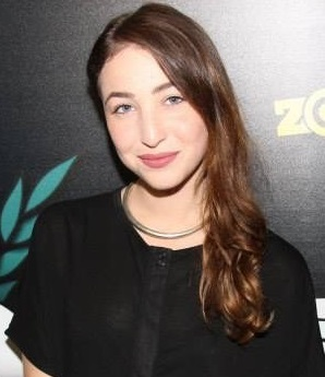 שירה נאור מתוך זוהר יעקובסון עם אישור לשימוש.